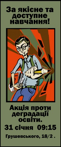 Інтернет-аватар до акції 31 січня 2011 року «За якісне та доступне навчання».